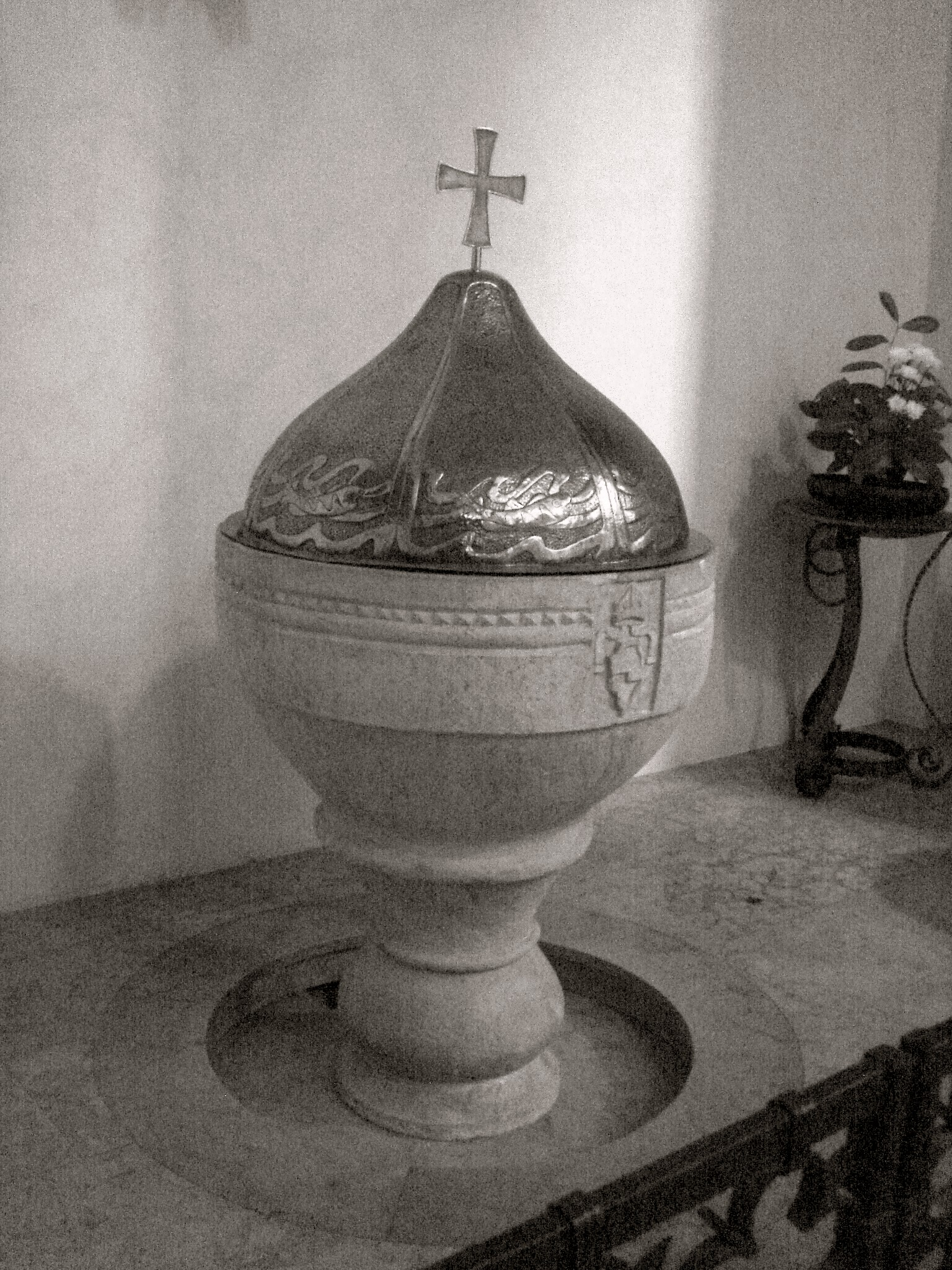 Conegliano: interno del Duomo, fonte battesimale quattrocentesco.